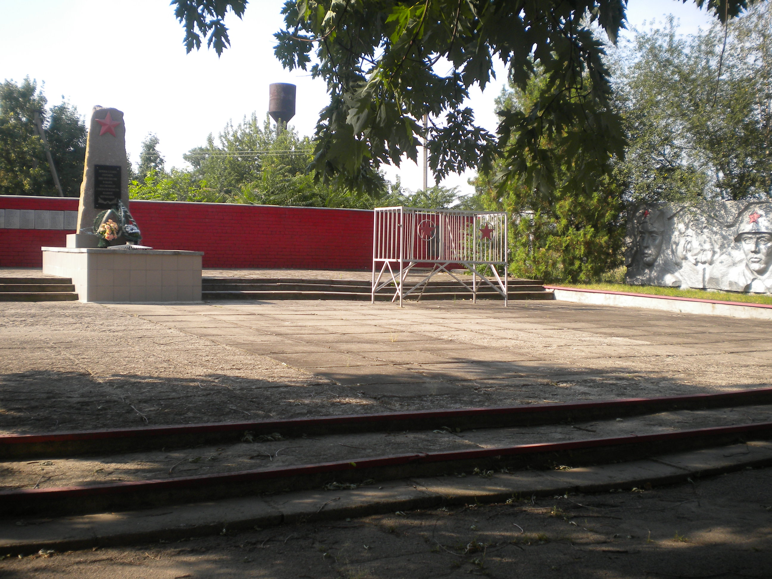 Обелиск героям войны (с.Китайгородка)